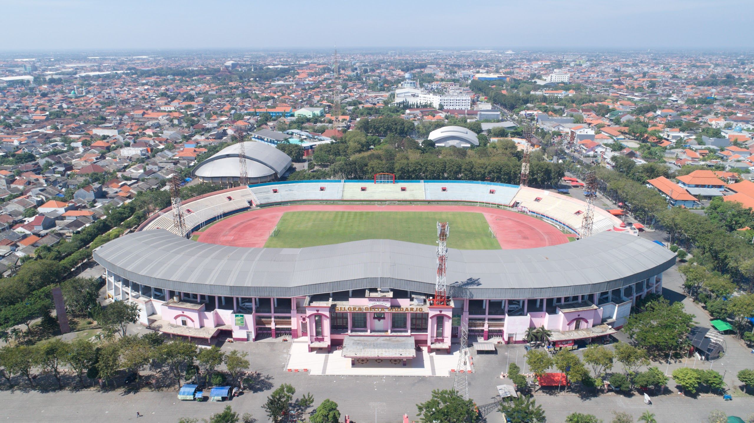 2018-06-29 Gelora Delta Sidoarjo